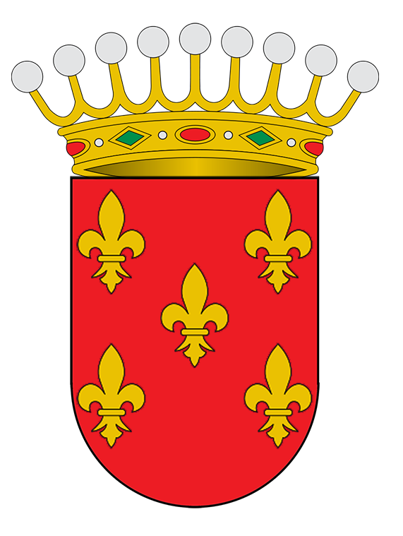 Escudo condado bureta En campo de gules, cinco flores de lis, de oro, bien distribuidas: una en el centro y las otras en cada esquina.